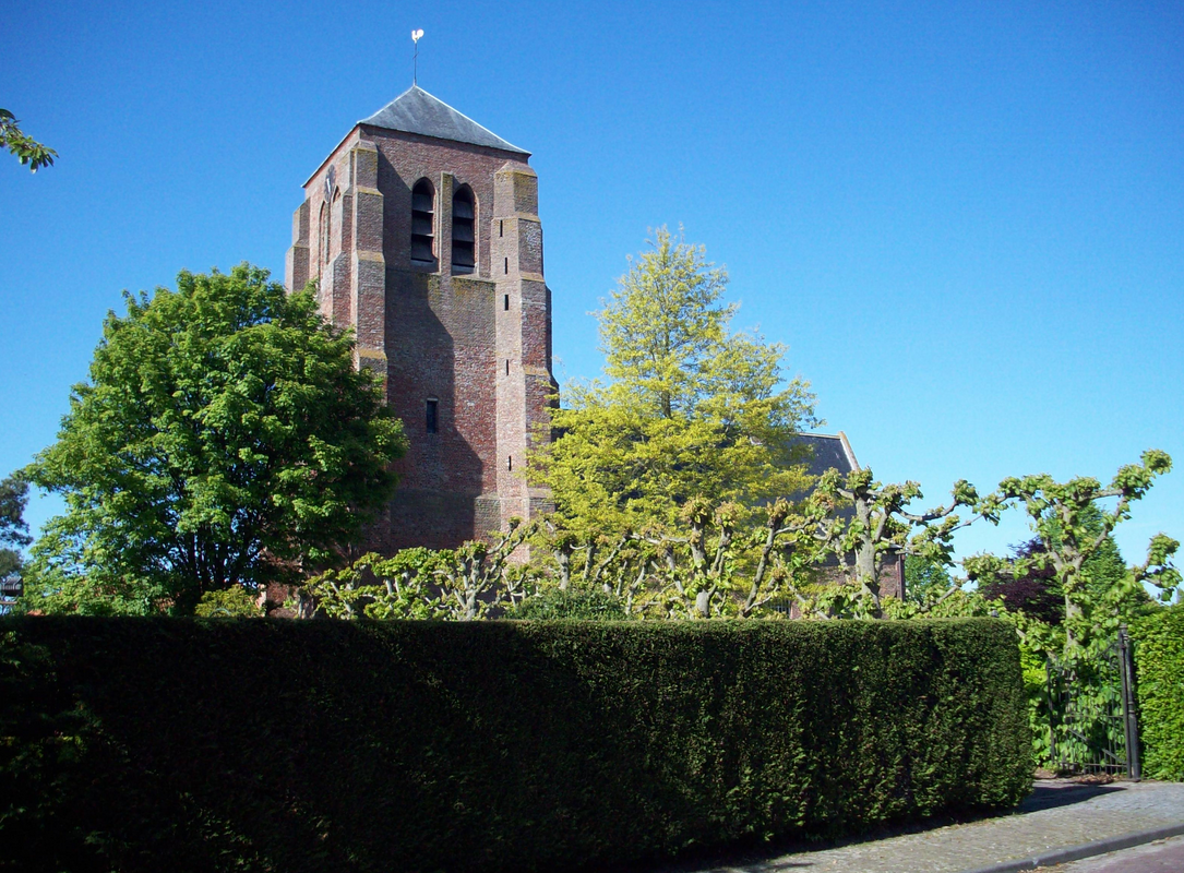 Rijksmonument Sint Kruis - Kerk